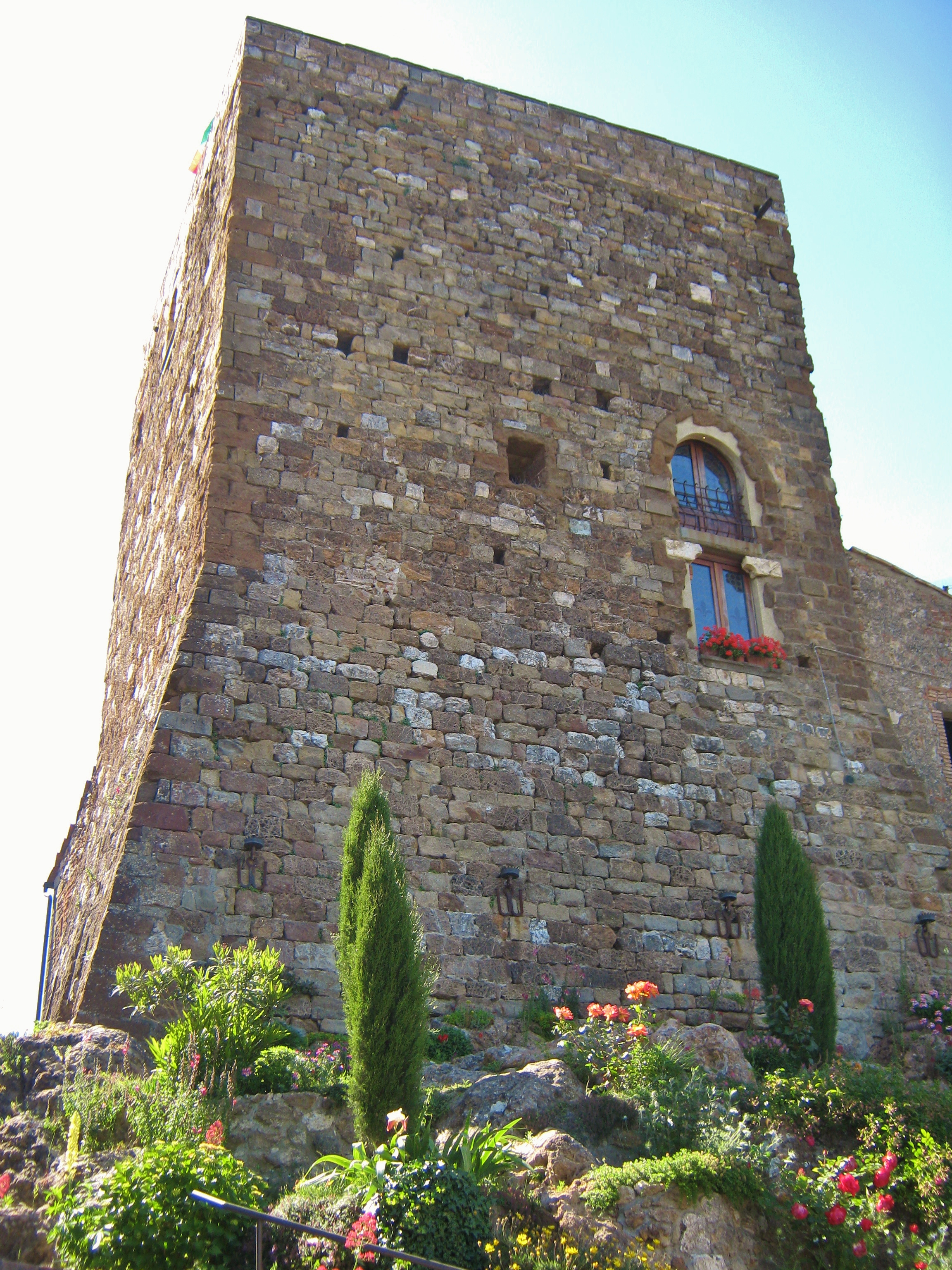 La Sassa, frazione di Montecatini Val di Cecina: la torre.